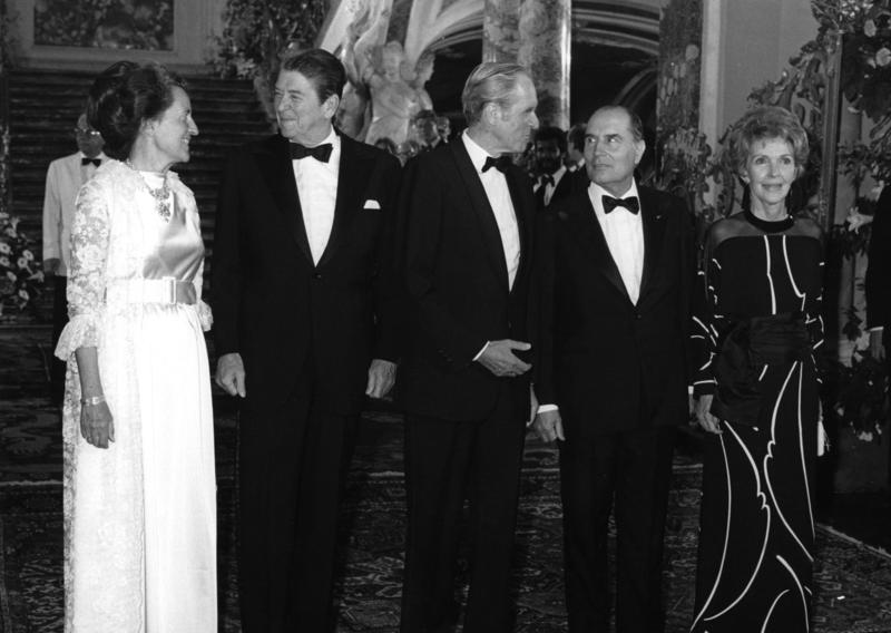 Tagung des Nordatlantikrats unter Beteiligung von Staats- und Regierungschefs am 9. und 10. Juni 1982 in Bonn. Der Nordatlantikrat, der politische Vorstand der Nordatlantikpaktorganisation (NATO), trat am 10. Juni 1982 in Bonn zusammen. Der NATO-Rat besteht aus den Vertretern der 16 Mitgliedsländer. Am 30. Mai 1982 wurde Spanien 16. Vollmitglied im Atlantischen Bündnis. Am Vorabend des NATO-Gipfels gaben der Bundespräsident und Frau Carstens im Schloß Augustusburg ein Essen zu Ehren der Staats- und Regierungschefs. Am darauffolgenden Tag wurde das Gipfeltreffen im Plenarsaal des Deutschen Bundestages eröffnet. Die Sitzungen fanden im NATO-Saal des Bundeskanzleramtes statt. Anläßlich eines Abendessens im Schloß Augustusburg in Brühl bei Bonn (9. Juni 1982) v.l.n.r.: Frau Dr. Veronica Carstens, Präsident Ronald Reagan, Bundespräsident Karl Carstens, Präsident Francois Mitterrand und Nancy Reagan